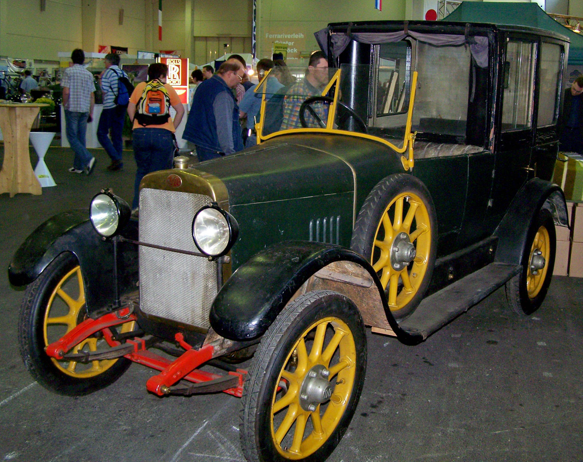 Baujahr 1924 - 1925 Internationale Oldtimer Messe Tulln an der Donau (A)